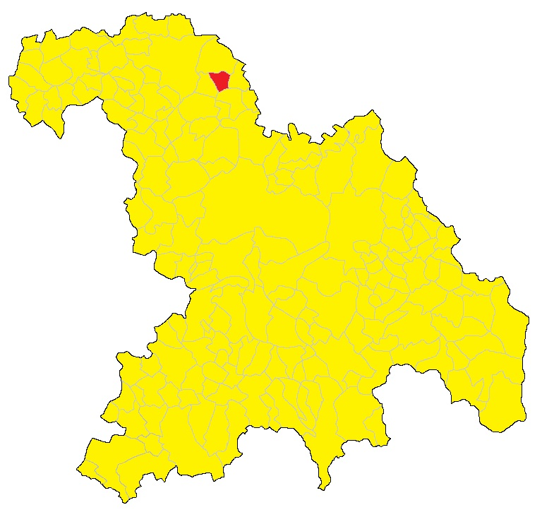 Mappa del comune di Ticineto (AL)